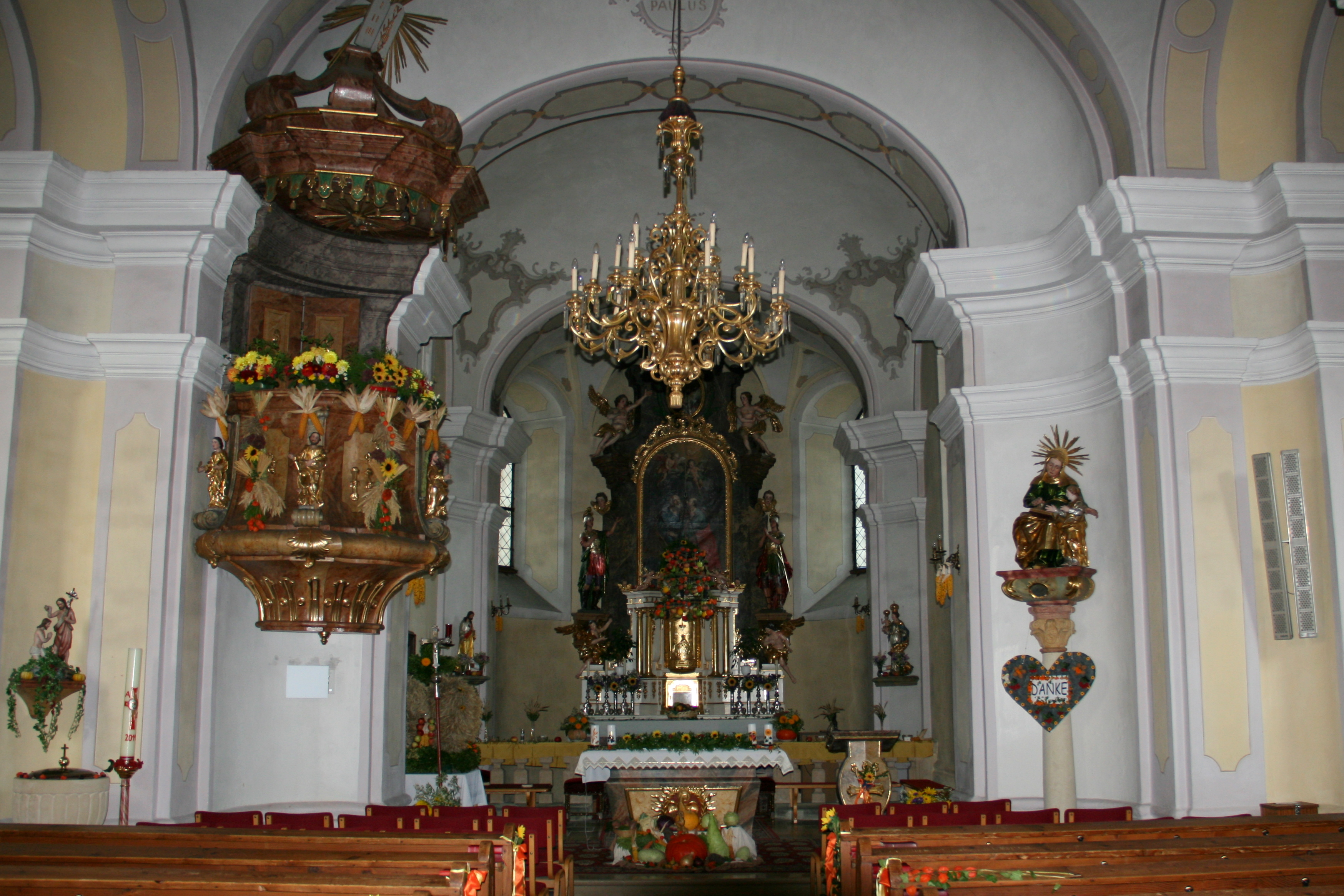 Kath. Pfarrkirche hll. Peter und Paul und Kirchhofmauer